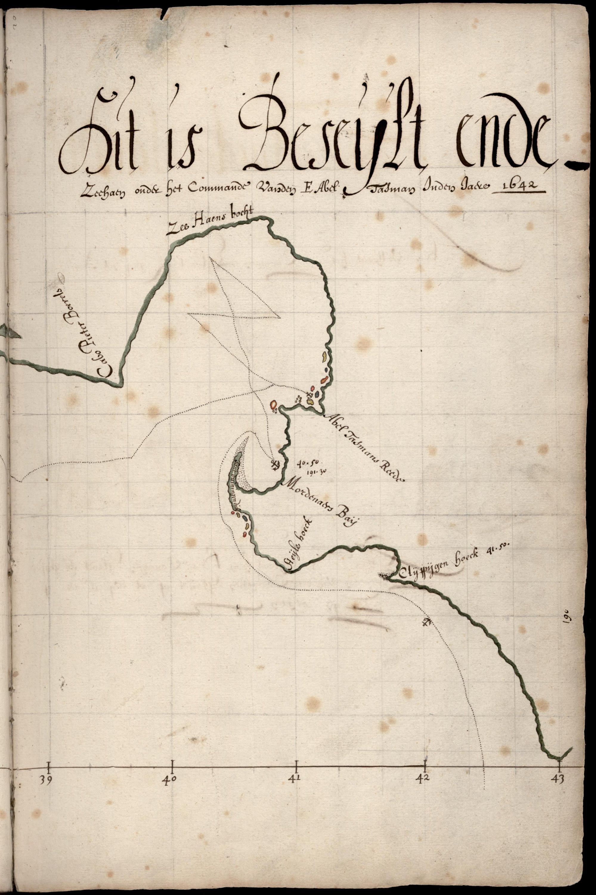 Journaal van Abel Tasman Jansz., 1642 Journal of Abel Tasman, 1642